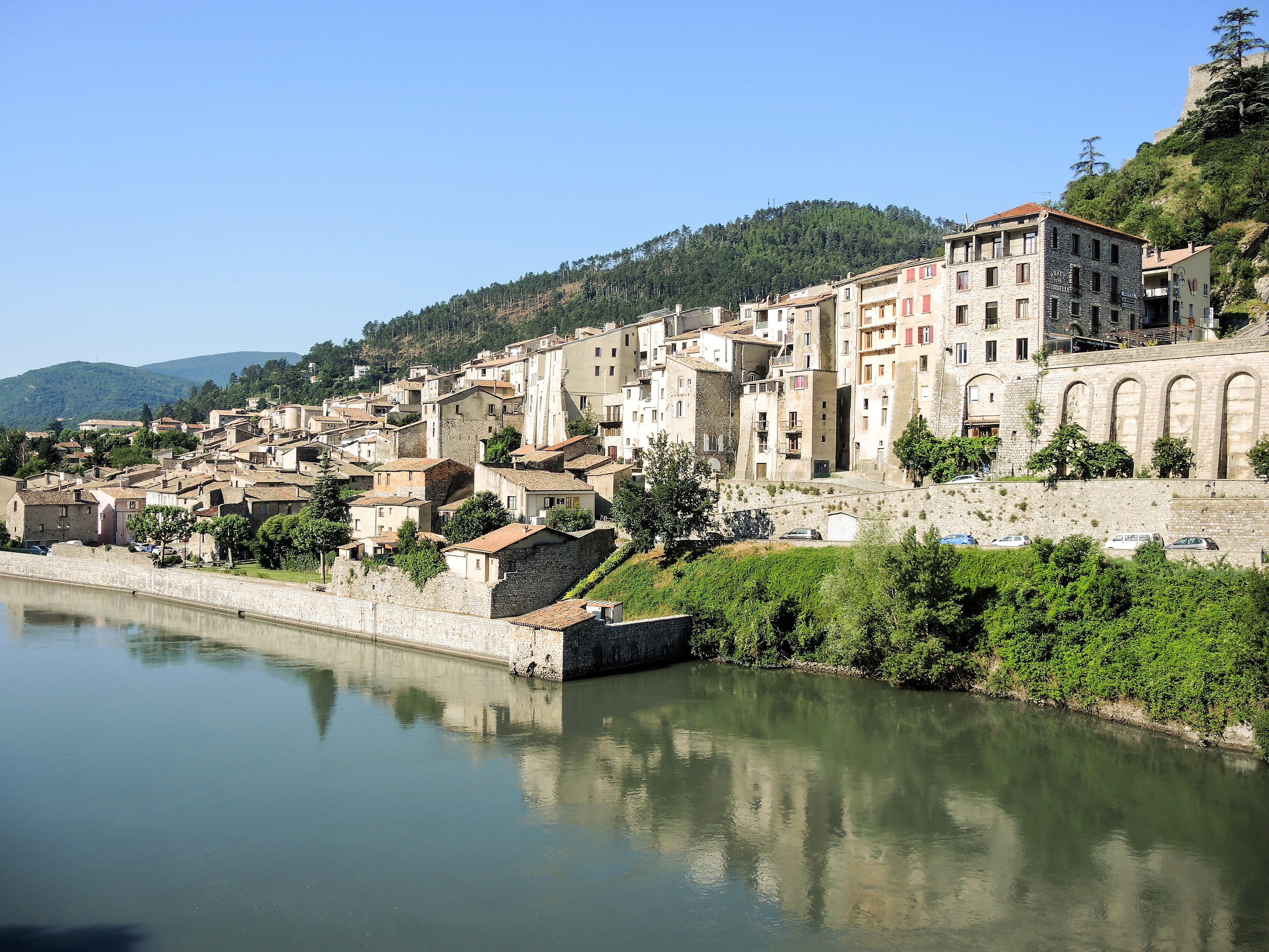 Quartier de La Baume, vu de Sisteron